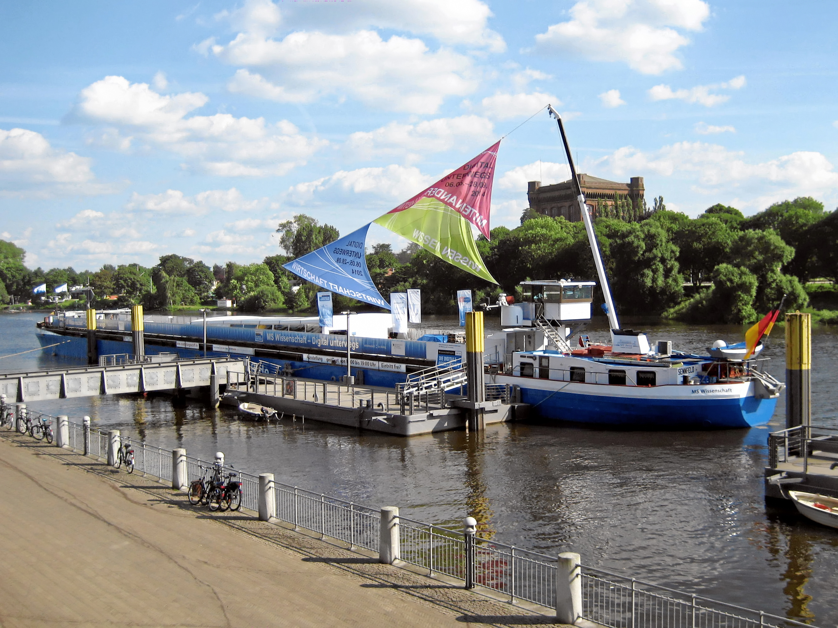 Die MS Wissenschaft (2014) mit der Ausstellung „Digital unterwegs“ während ihres Aufenthalts in Bremen, Deutschland, auf der Weser an der Anlegestelle „Tiefer“.